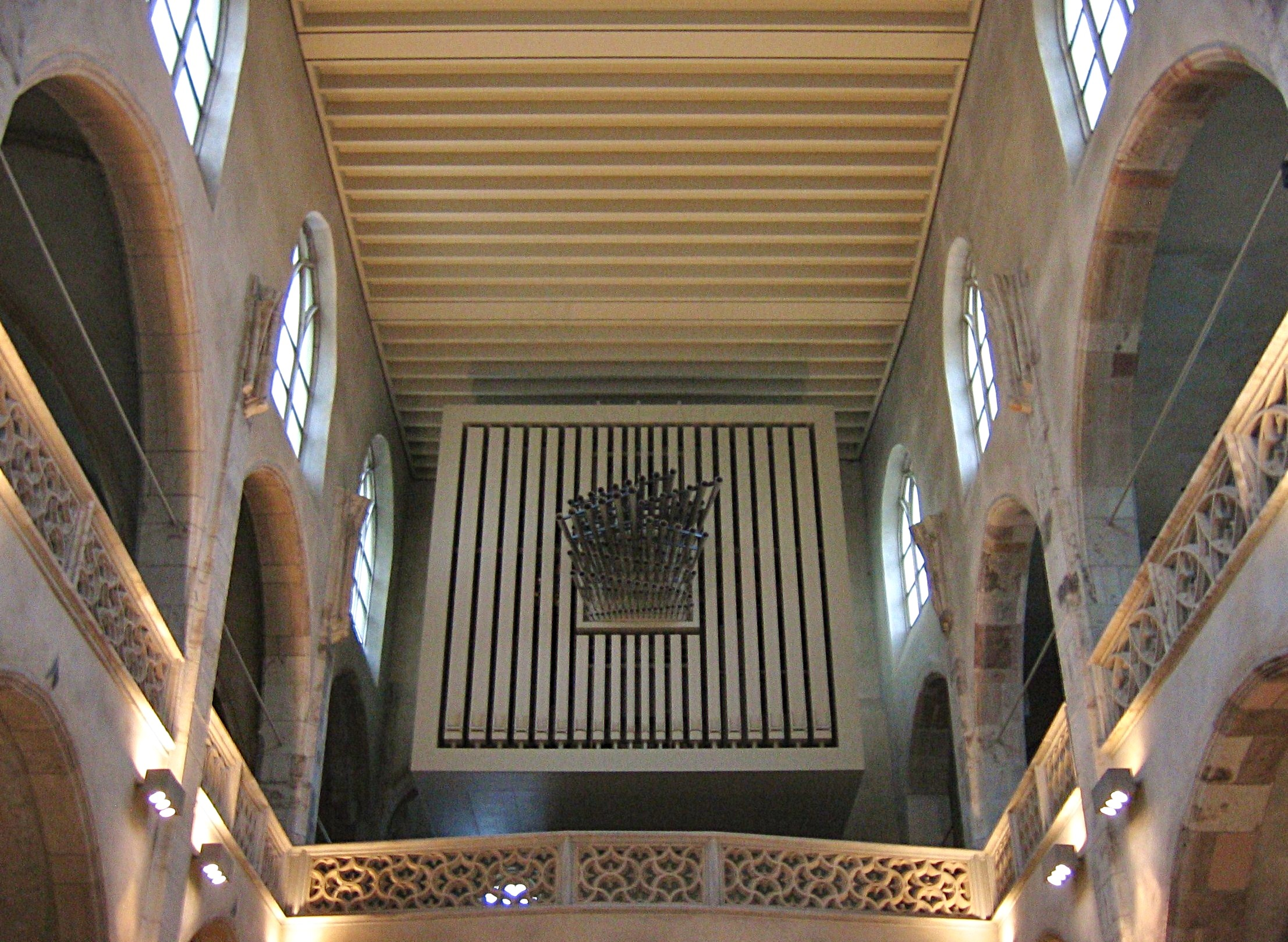 Hauptorgel der Jesuitenkirche St. Peter in Köln